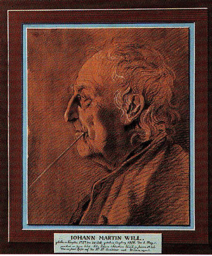 Johann Martin Will (1727–1806), Zeichnung seines Enkels Johann Lorenz Walch (1787–1840). 1936 im Besitz von Regina Walch, Augsburg; 2002 im Besitz der Joh. Walch GmbH & Co., Augsburg